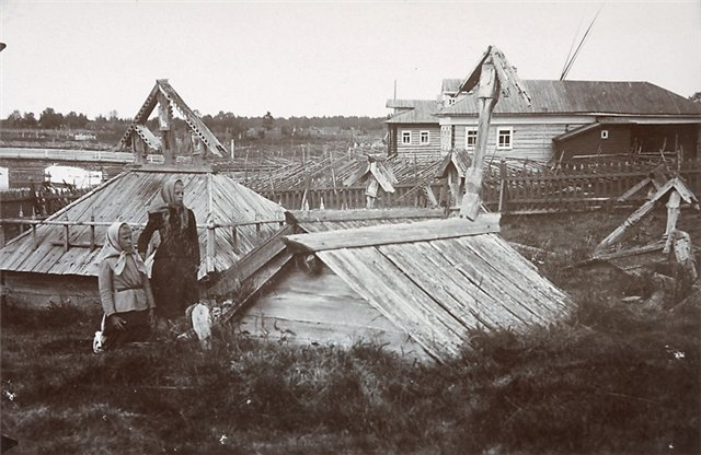 Староверческое кладбище с домовинами и памятниками-столбиками на берегу Белого моря.